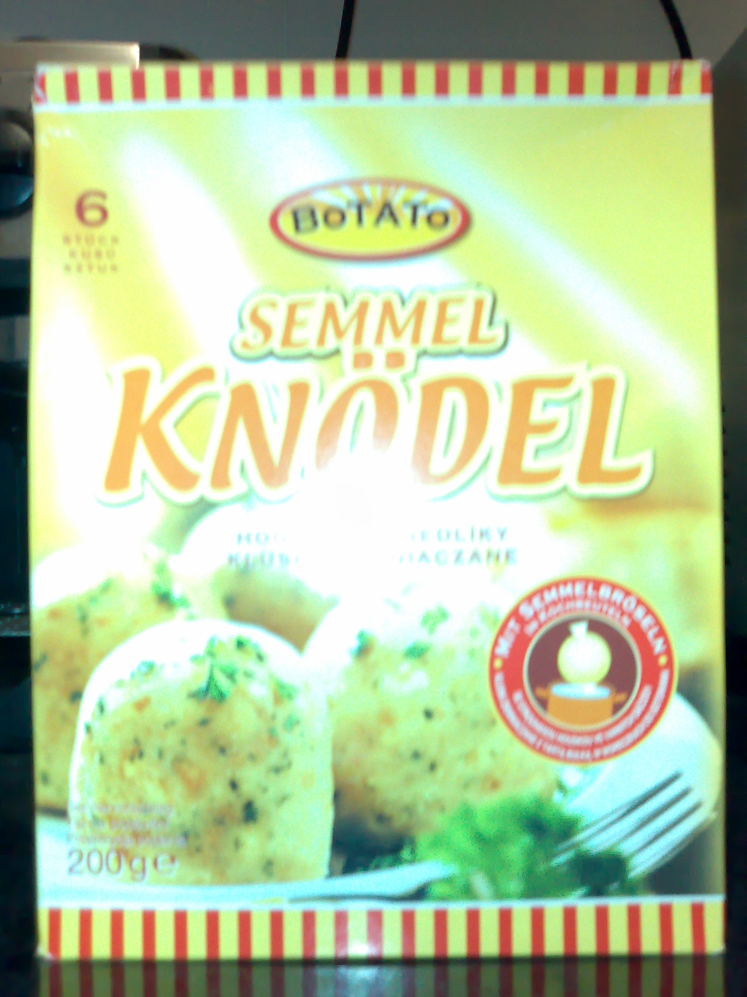 A package of german semmel knoedel.